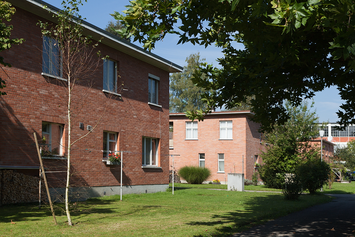 Wohnhäuser im Bata-Park des Bata-areals in Möhlin (AG)